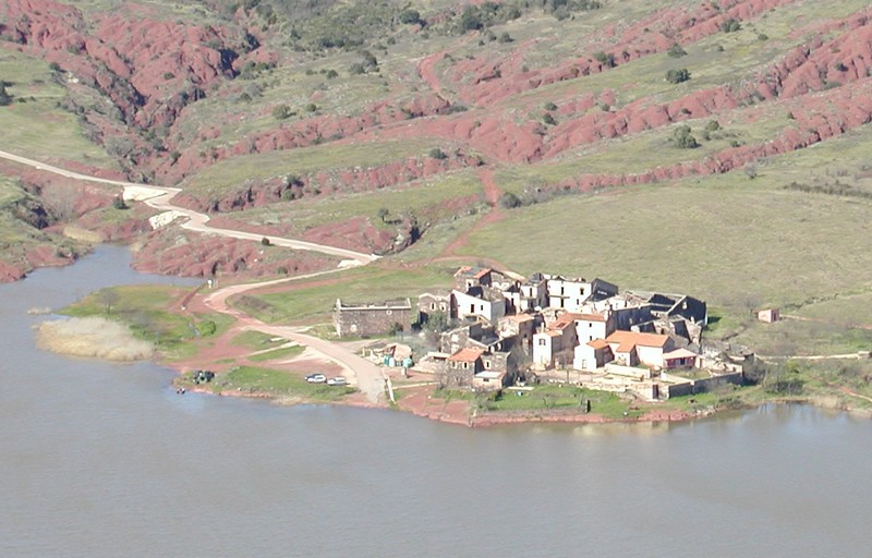 Description: Village de Celles ( Hérault, France). Epargné de justesse par la mise en eau du Lac du Salagou. Aujourd'hui pratiquement désert. Source: Hugo Soria Licence: GFDL Hugo Soria